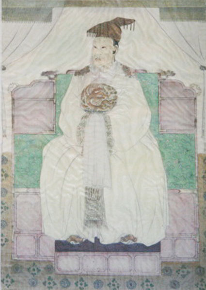 태조 왕건 동상 (연천 숭의전 안에 있음), 조선시대 제작한 왕건 영정의 모사본(1950년대 이전 제작)